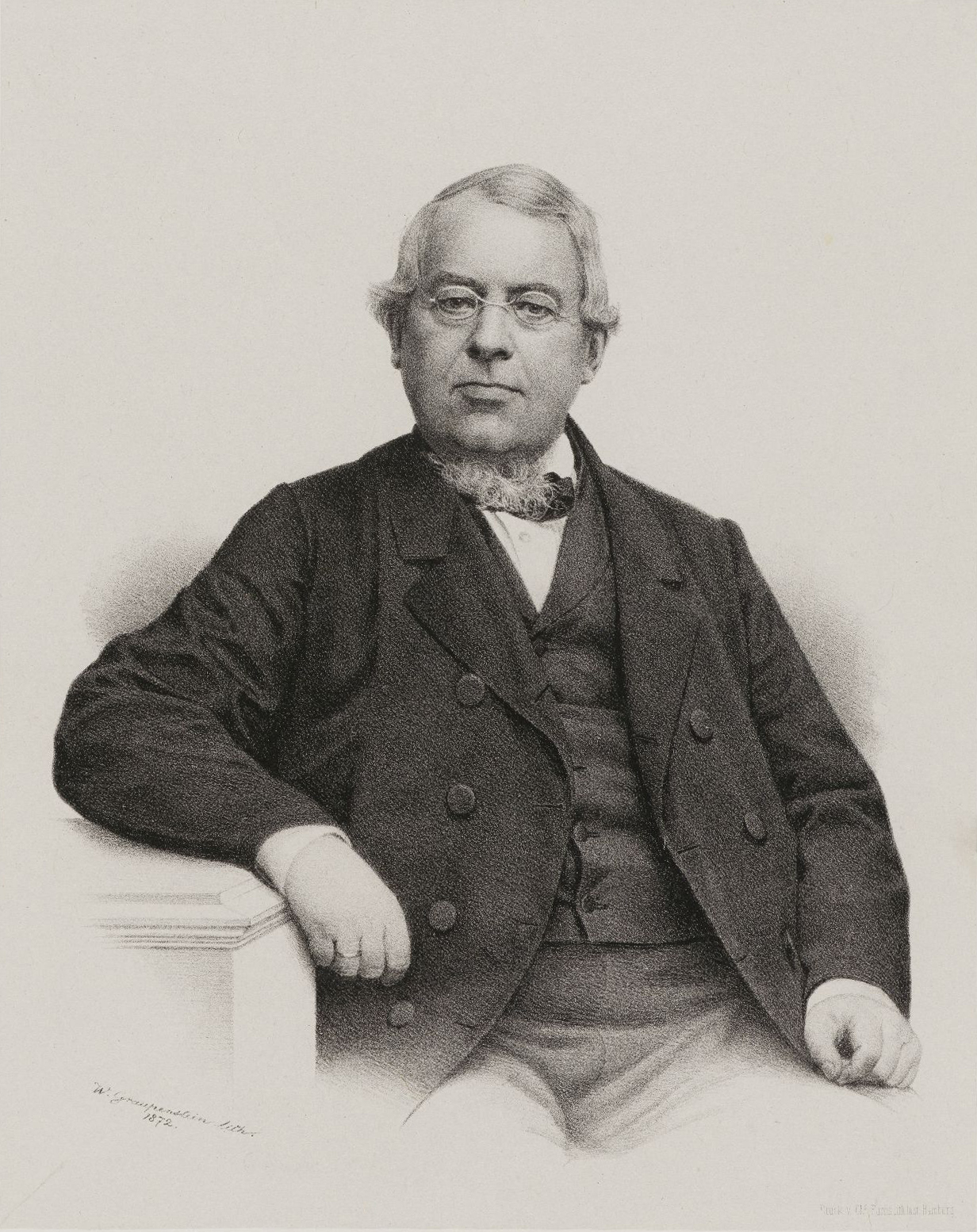 Porträt Johann Roosen-Runge von Friedrich Wilhelm Graupenstein